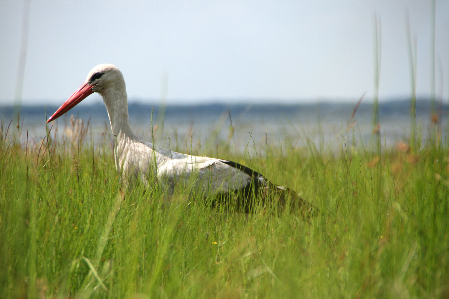 Шацький національний природний парк